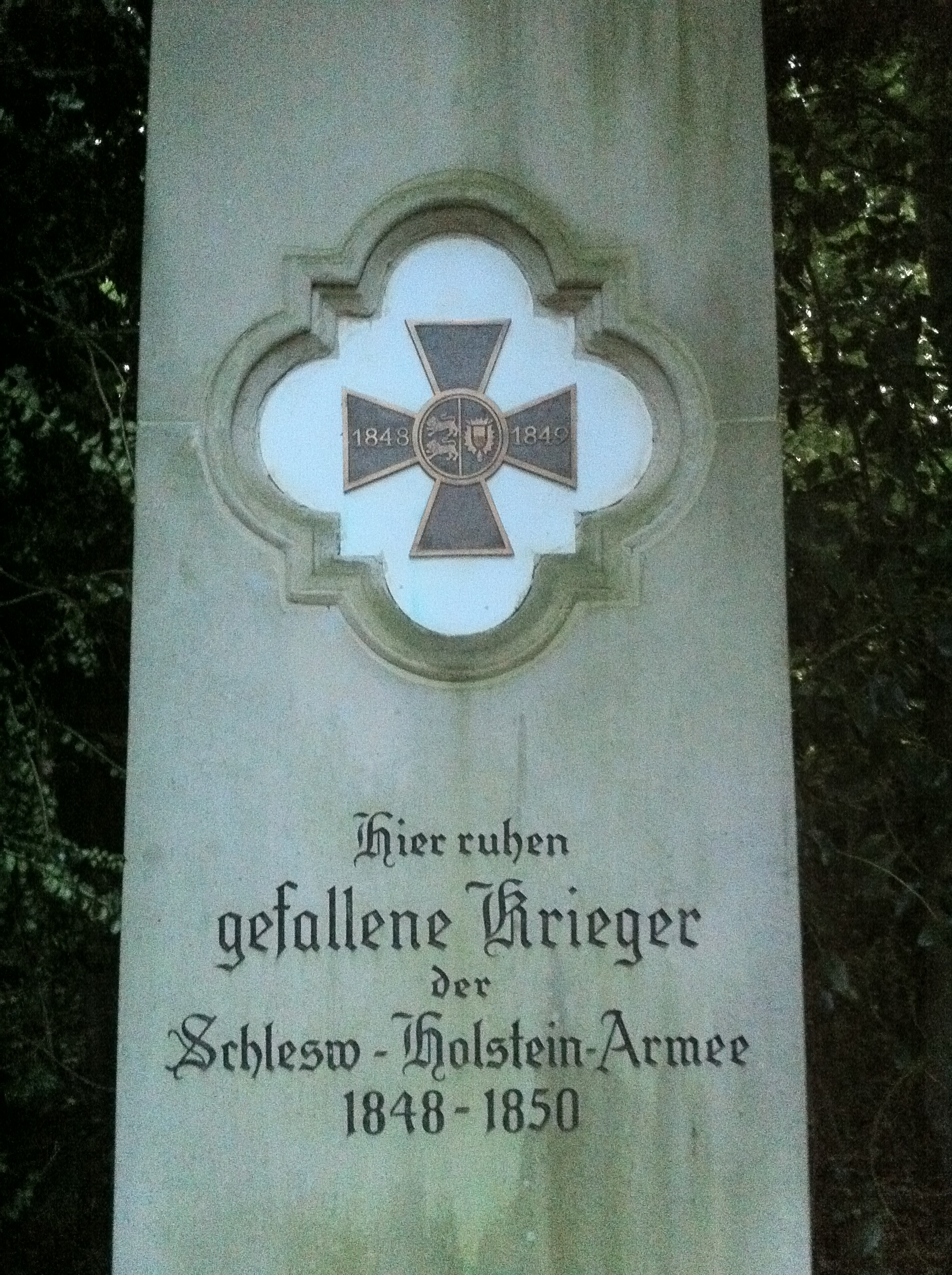 Nordfriedhof Kiel Grabmal Schleswig Holstein Krieg 1849